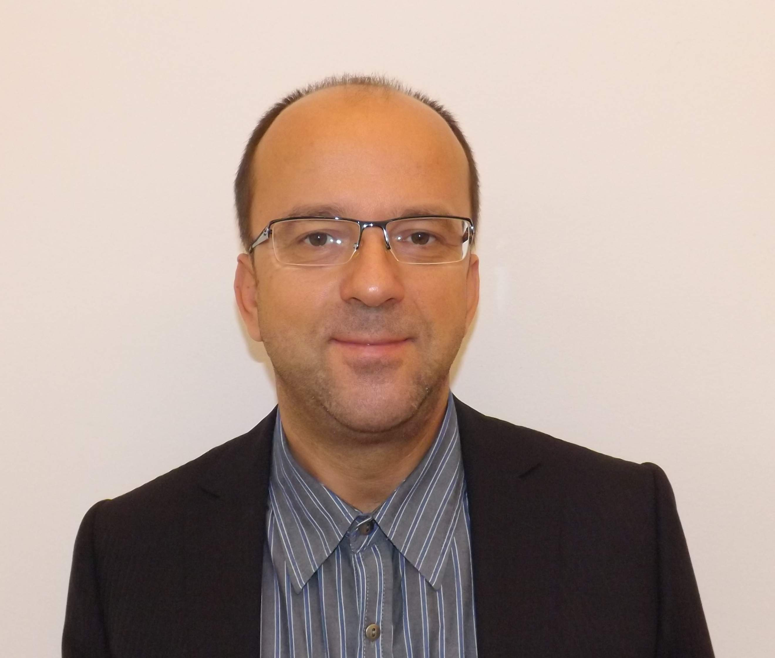 Roman Kotliński, poseł Twojego Ruchu.